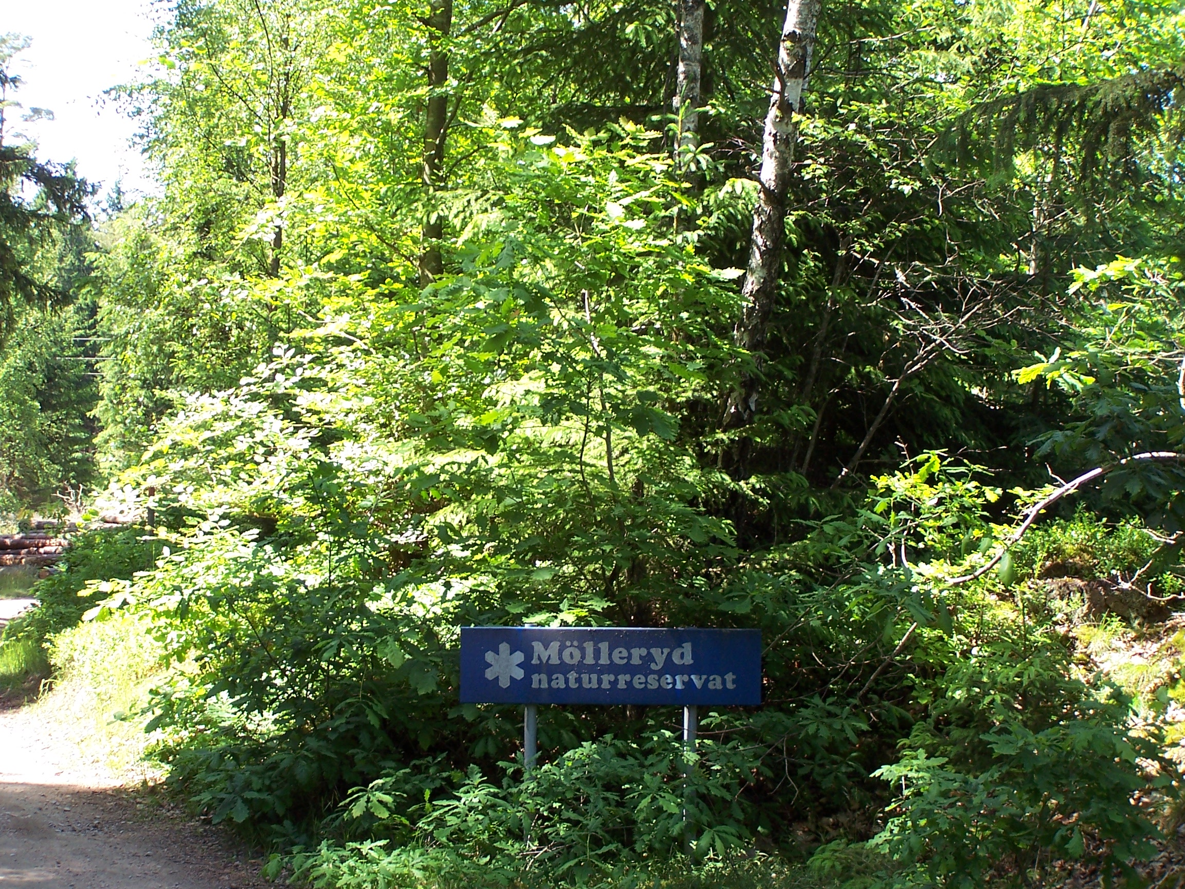 Mölleryds naturreservat